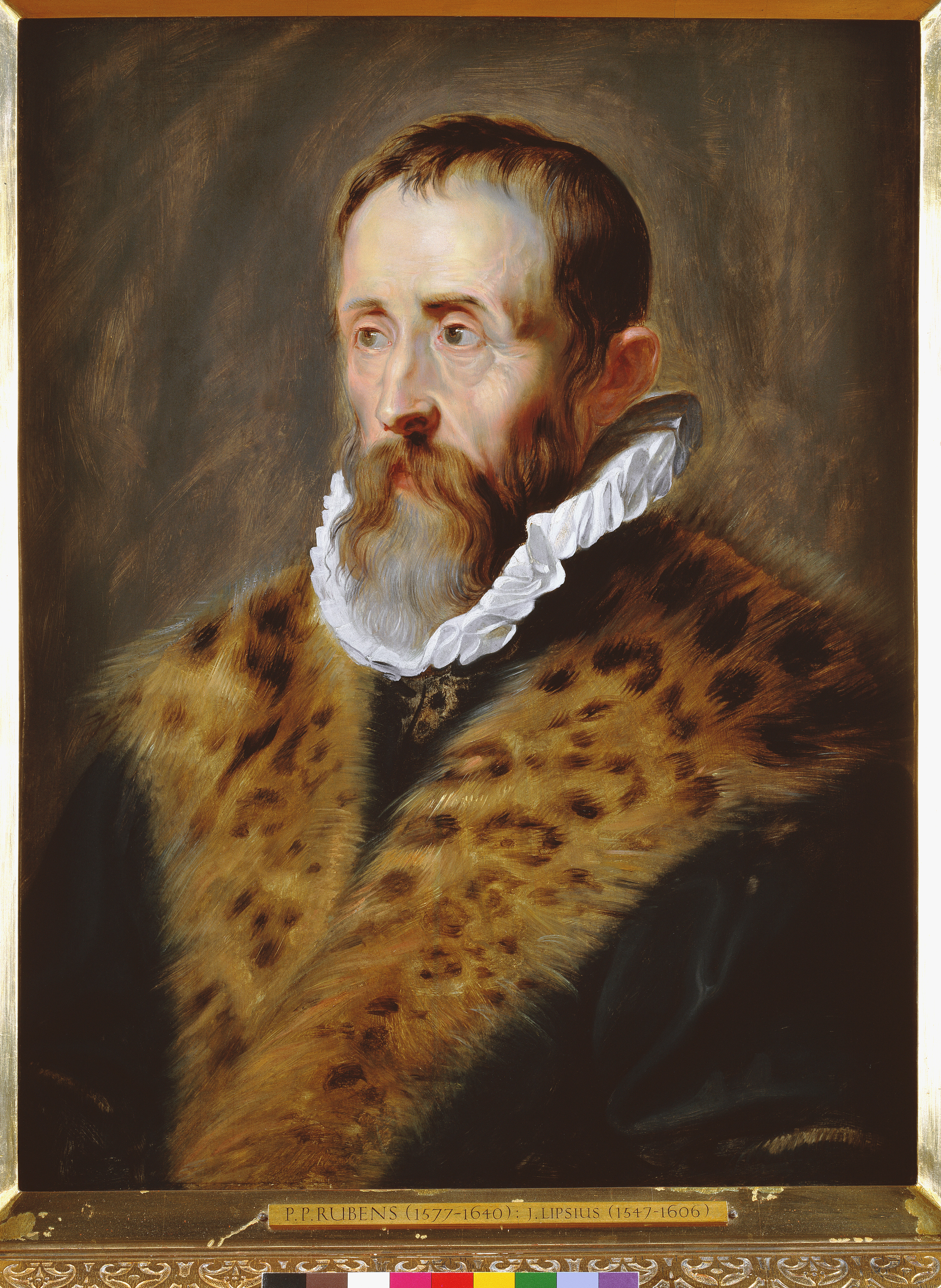 schilderij ( Peter Paul Rubens ( Museum Plantin-Moretus